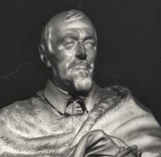 Ercole Antonio Raggi: Statue des Kardinals Marzio Ginetti in der Cappella Ginetti, Sant'Andrea della Valle, Rom, 1670-1675; Foto vor 1919